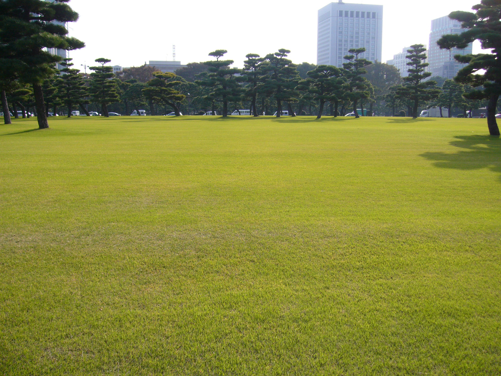 Turf,imperial palace plaza,chiyoda-city,japan